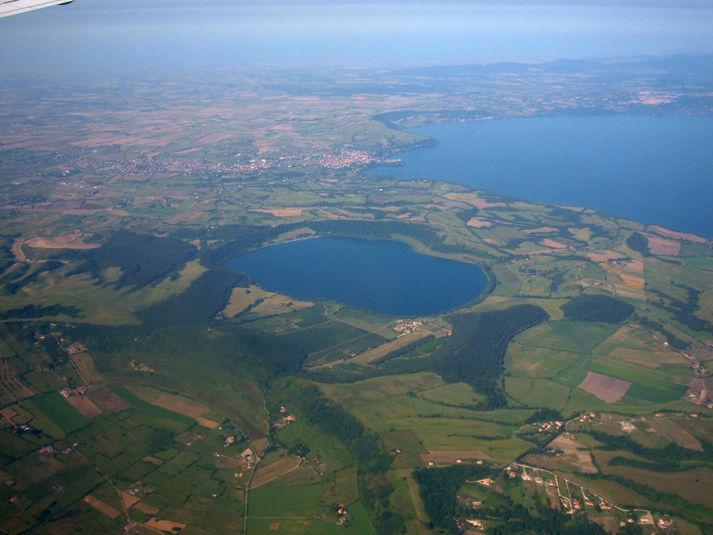 Vista aerea del lago di Martignano. A destra si intravede il lago di Bracciano.